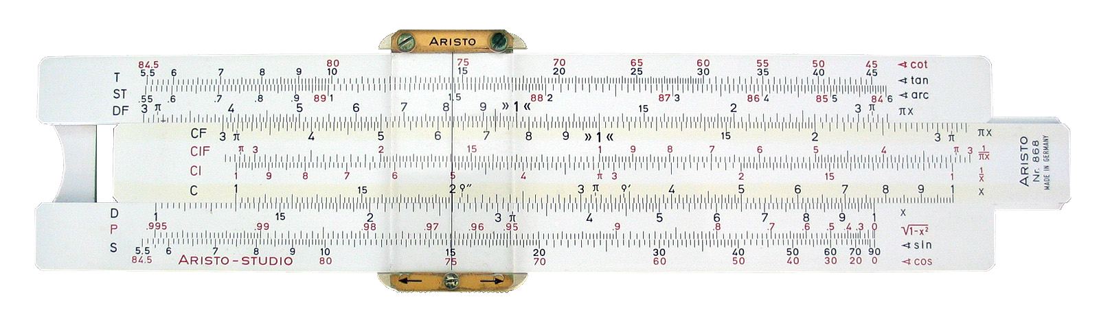 Логарифмическая линейка